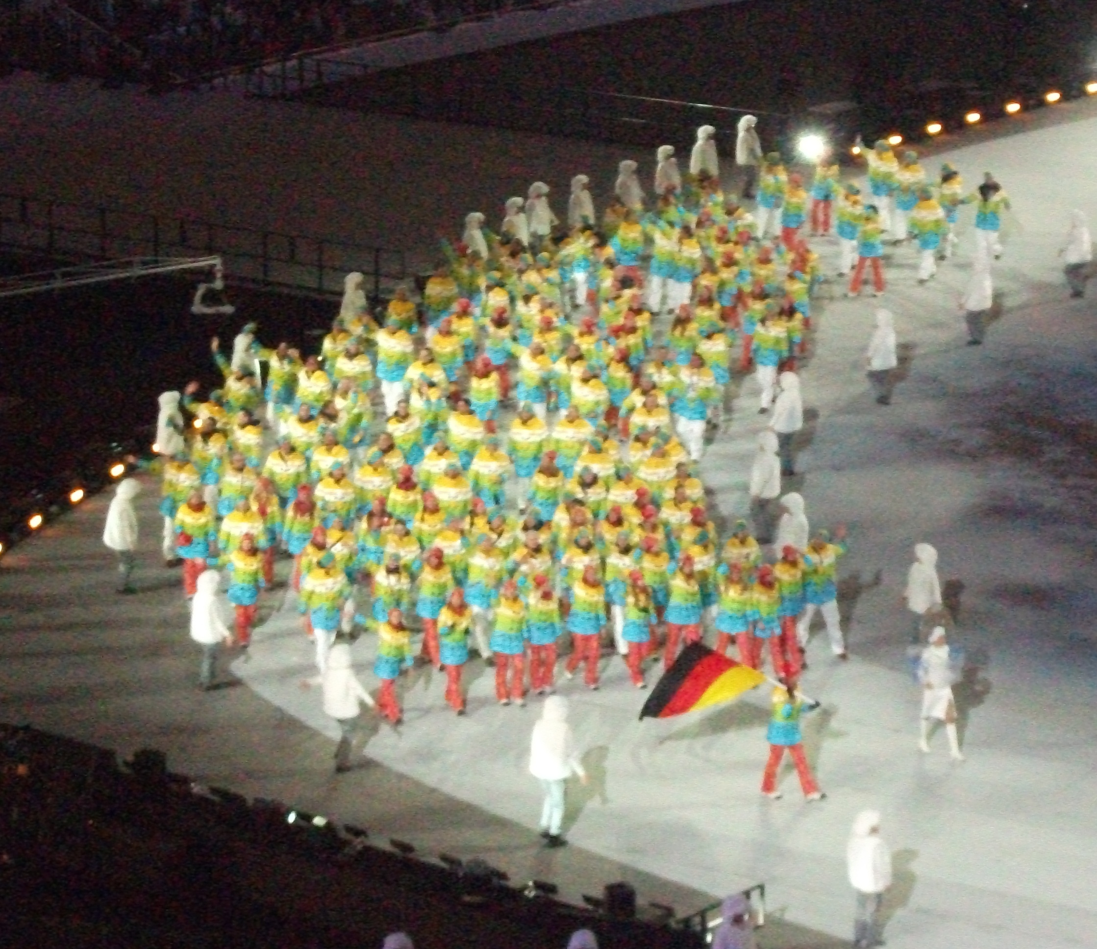 Сборная Германии на церемонии открытия Олимпийских игр в Сочи